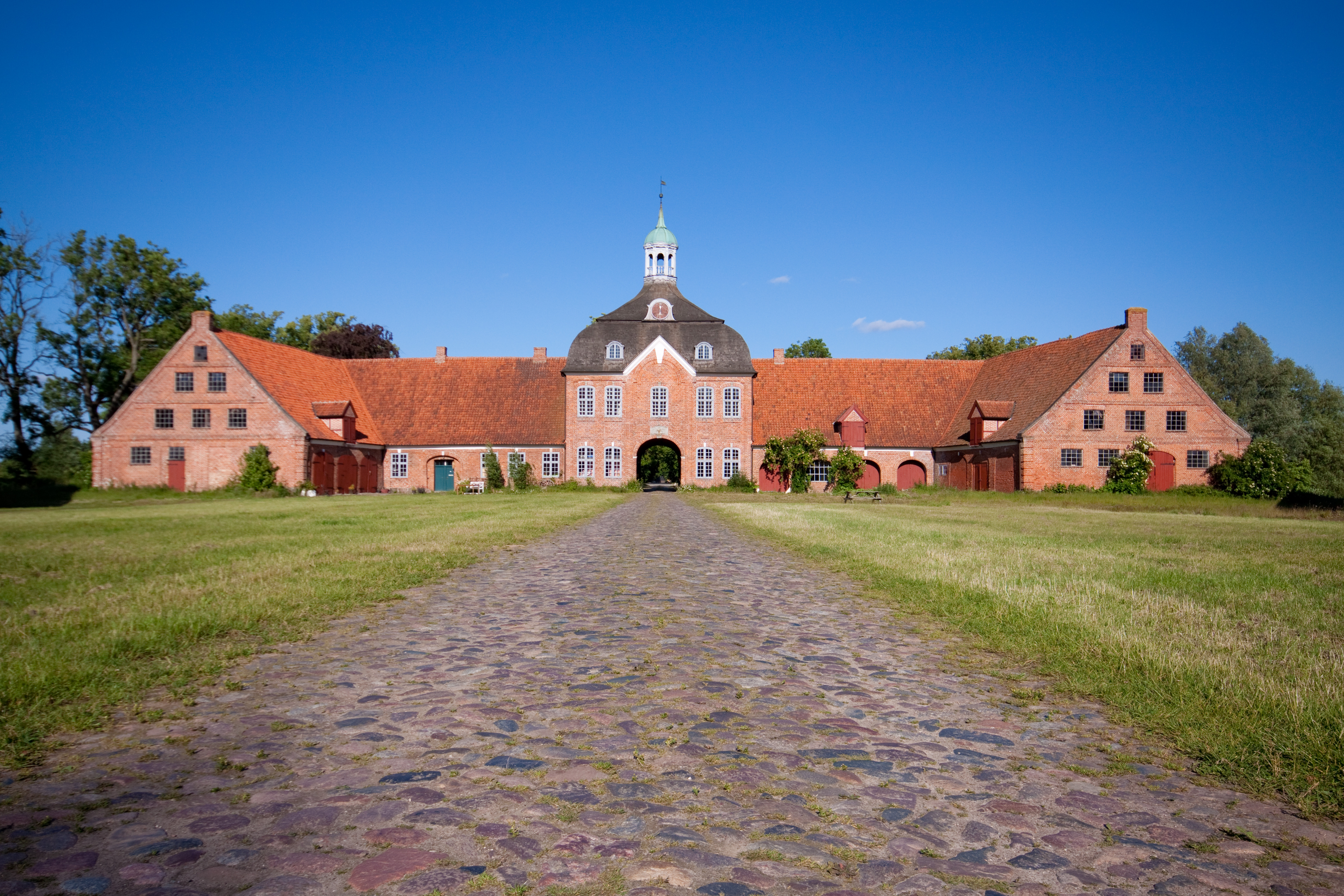 Torhaus des Gut Hasselburg